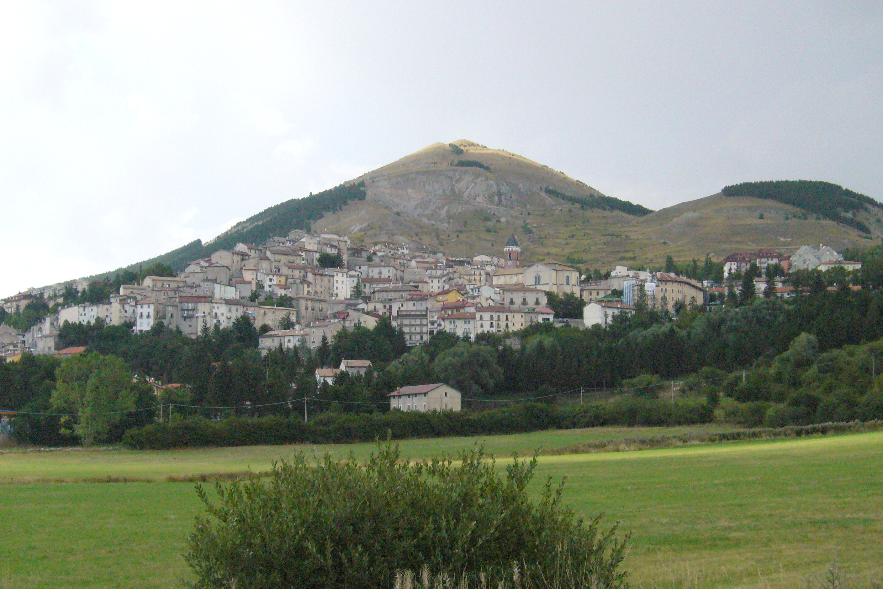 Pescocostanzo